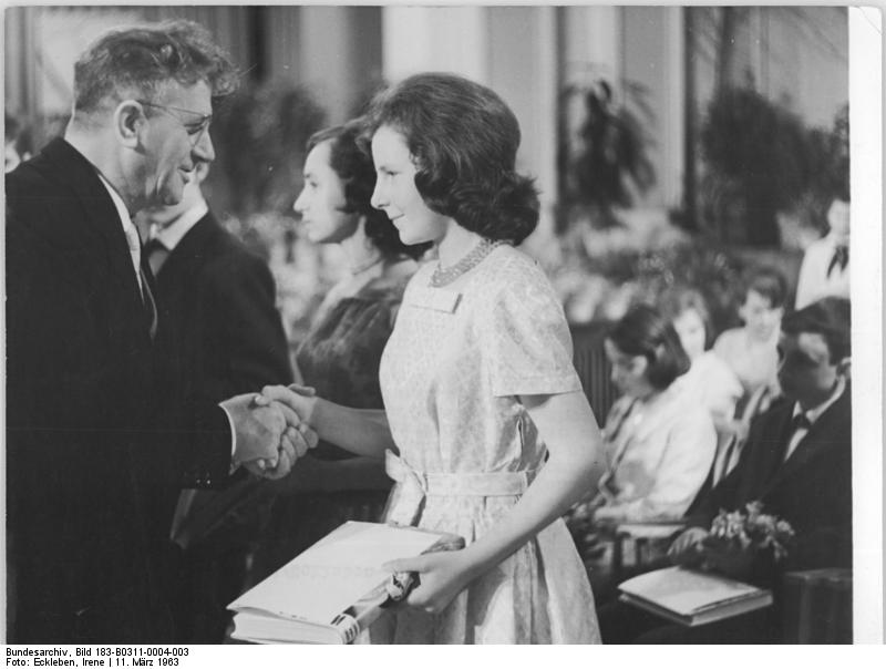 Mestlin, Jugendweihe, Feierstunde Zentralbild Eckleben Eckl.-At. 11.3.1963 Erste Jugendweihe des Jahres 1963 in Mestlin Im festlich geschmückten Kultursaal von Mestlin, Kreis Parchin, erlebten am 10.3.1963 Hunderte Einwohner dieses mecklenburgischen Dorfes die erste Jugendweihe des Jahres 1963. In einer würdigen Feierstunde legten 21 Mädchen und Jungen ihr feierliches Gelöbnis für ihren Arbeiter- und Bauern-Staat ab. Das Mitglied des Zentralkomitees und 1. Sekretär der SED-Bezirksleitung Schwerin, Bernhard Quandt, hielt die Festansprache. (Weiterer Text in der ADN-Meldung Nr. 78-206 vom 10.3.1963) UBz: Bernhard Quandt beglücktwünscht die Schülerin Karin Koski zur Jugendweihe. Karin wird nach Abschluß der Schulzeit eine Lehre als Geflügelzüchterin aufnehmen.